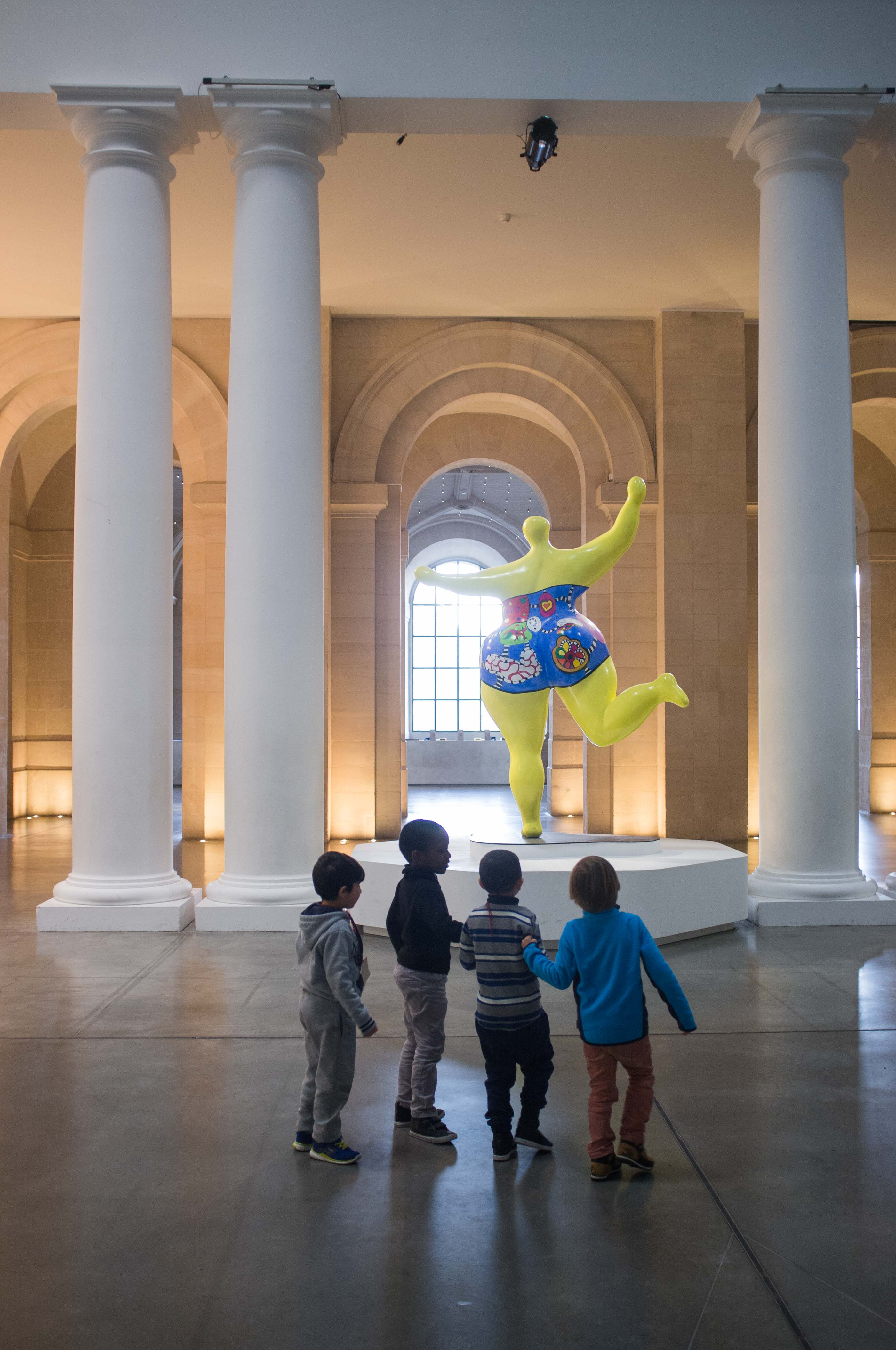 Groupe d'enfants devant la statue de Niki de Saint-Phalle